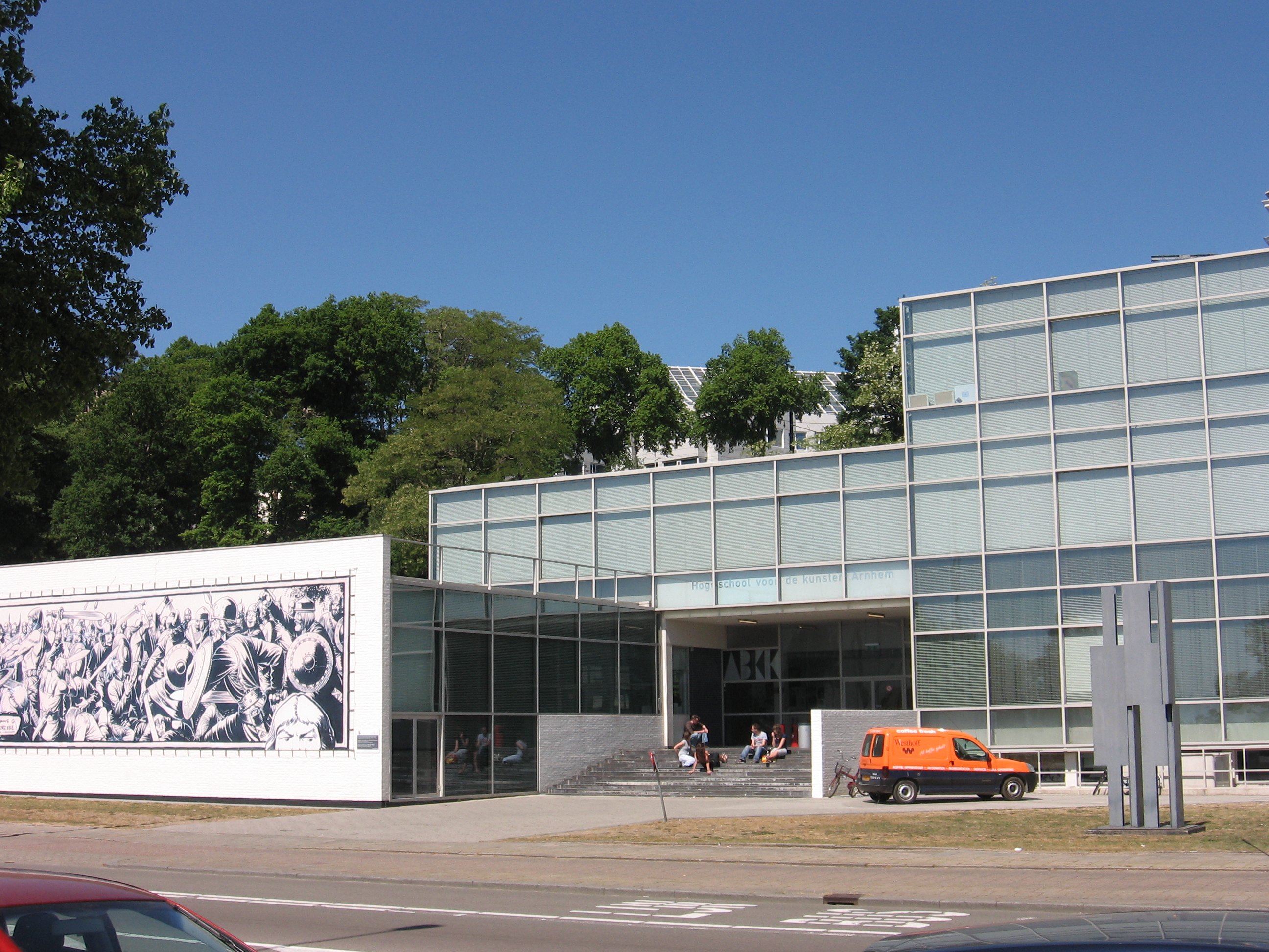 Hogeschool voor de kunsten Its number in the list of 89 proposed monuments is: k2013-020 For more information see Dutch WIkipedia: 89 topmonumenten uit de periode 1959-1965